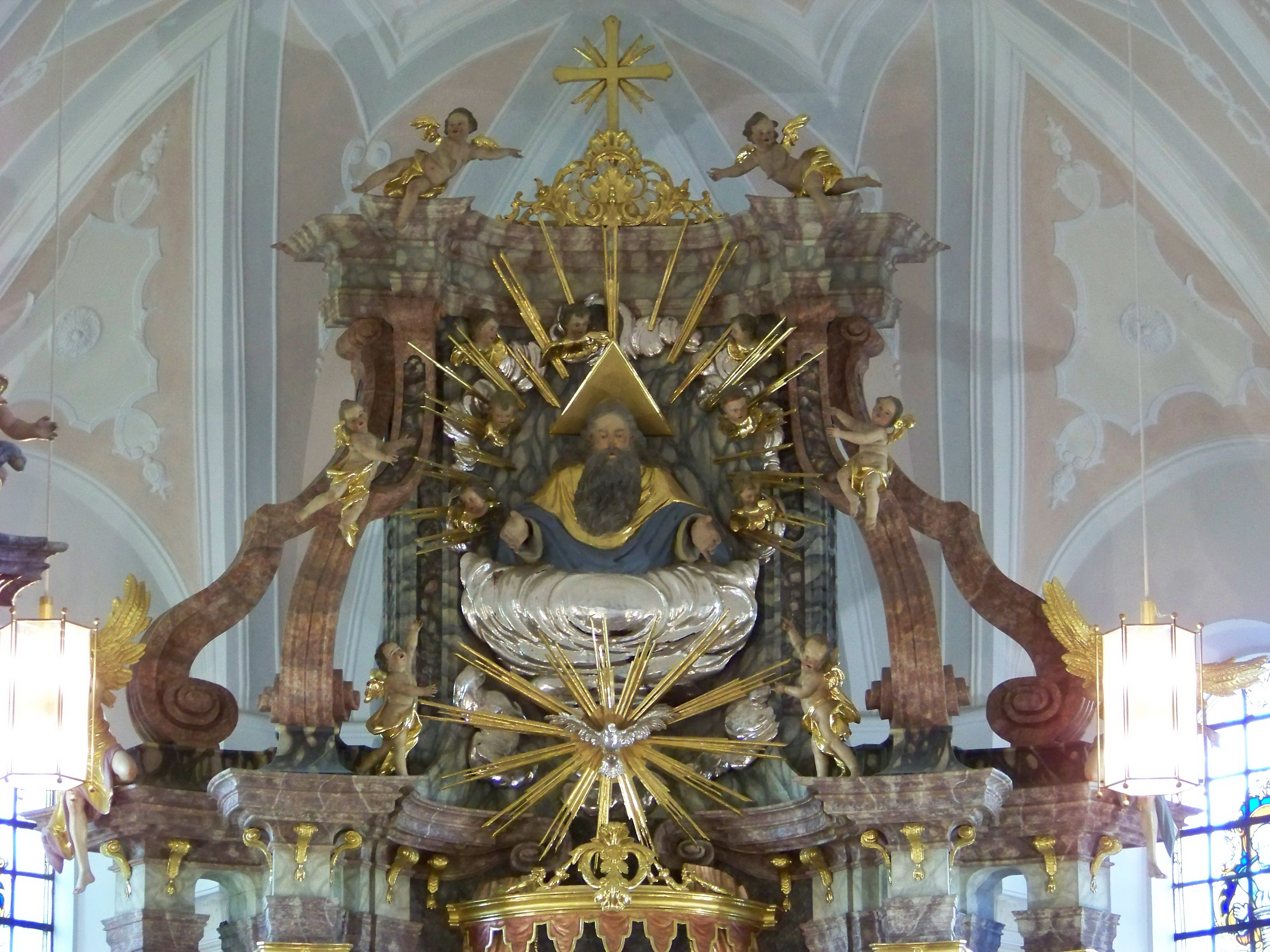 Mallersdorf-Pfaffenberg. Westen 82. Katholische Pfarrkirche Mariae Opferung. Hochaltar Aufzug mit Büste von Gottvater zwischen geschweiften Voluten.